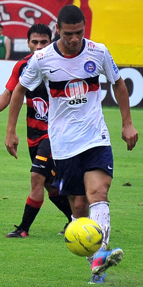 Marquinhos Gabriel no Bahia em 2013